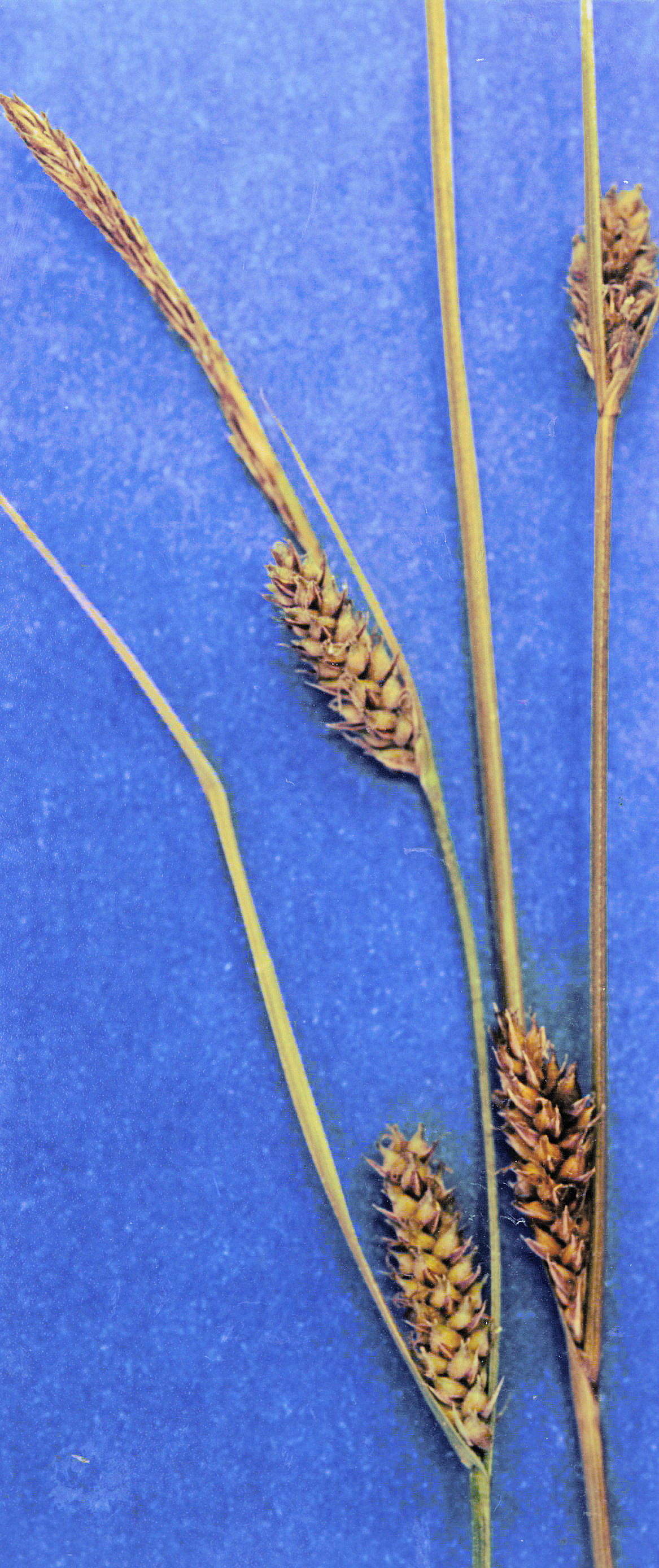 Carex lasiocarpa female inflorescens